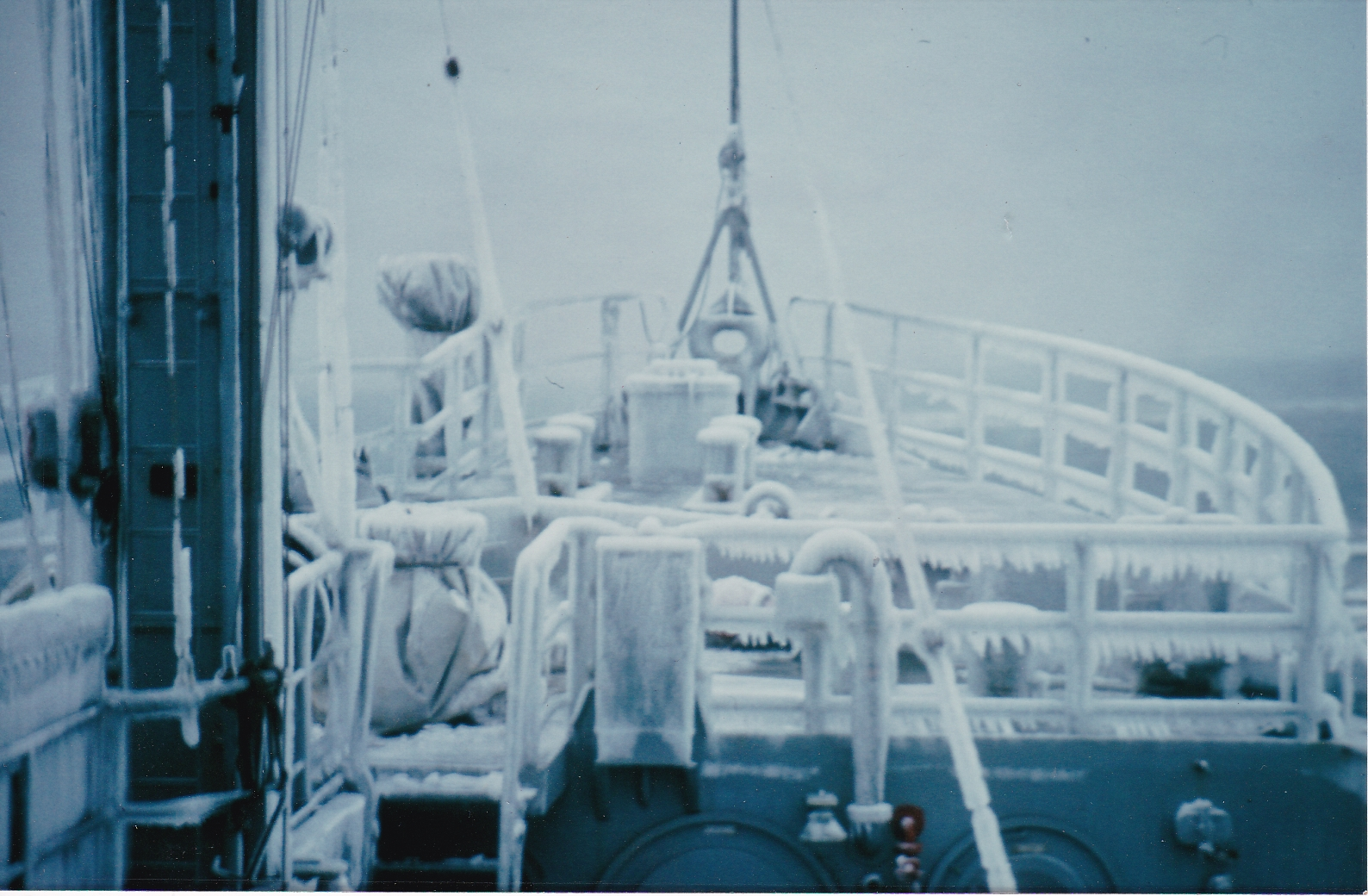 Gefrierendes Spritzwasser bildet Weißen Frost, der die Stabilität des Schiffes beeinträchtigen kann